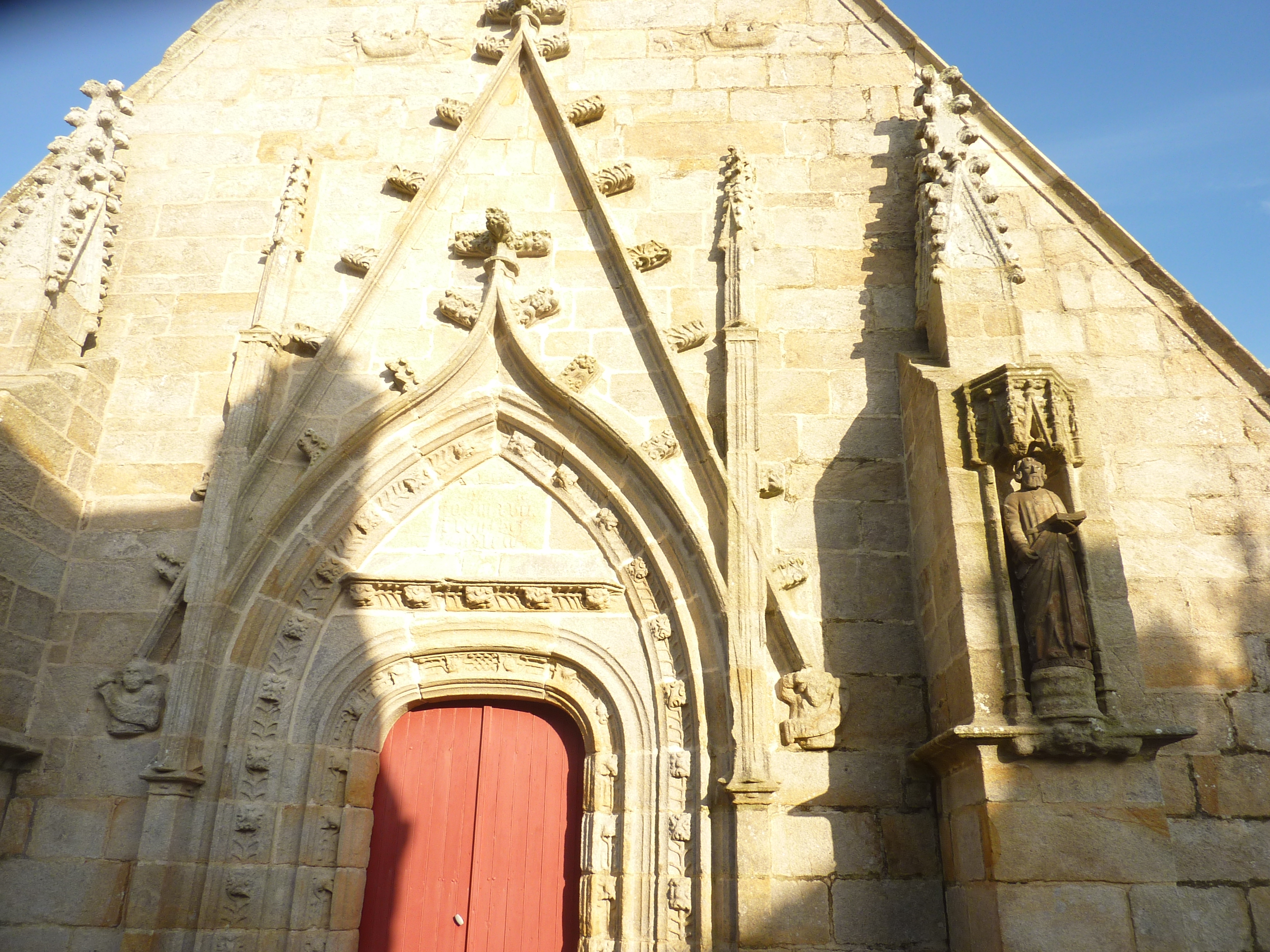 Plogoff : détail de la façade de l'église paroissiale Saint-Collodan